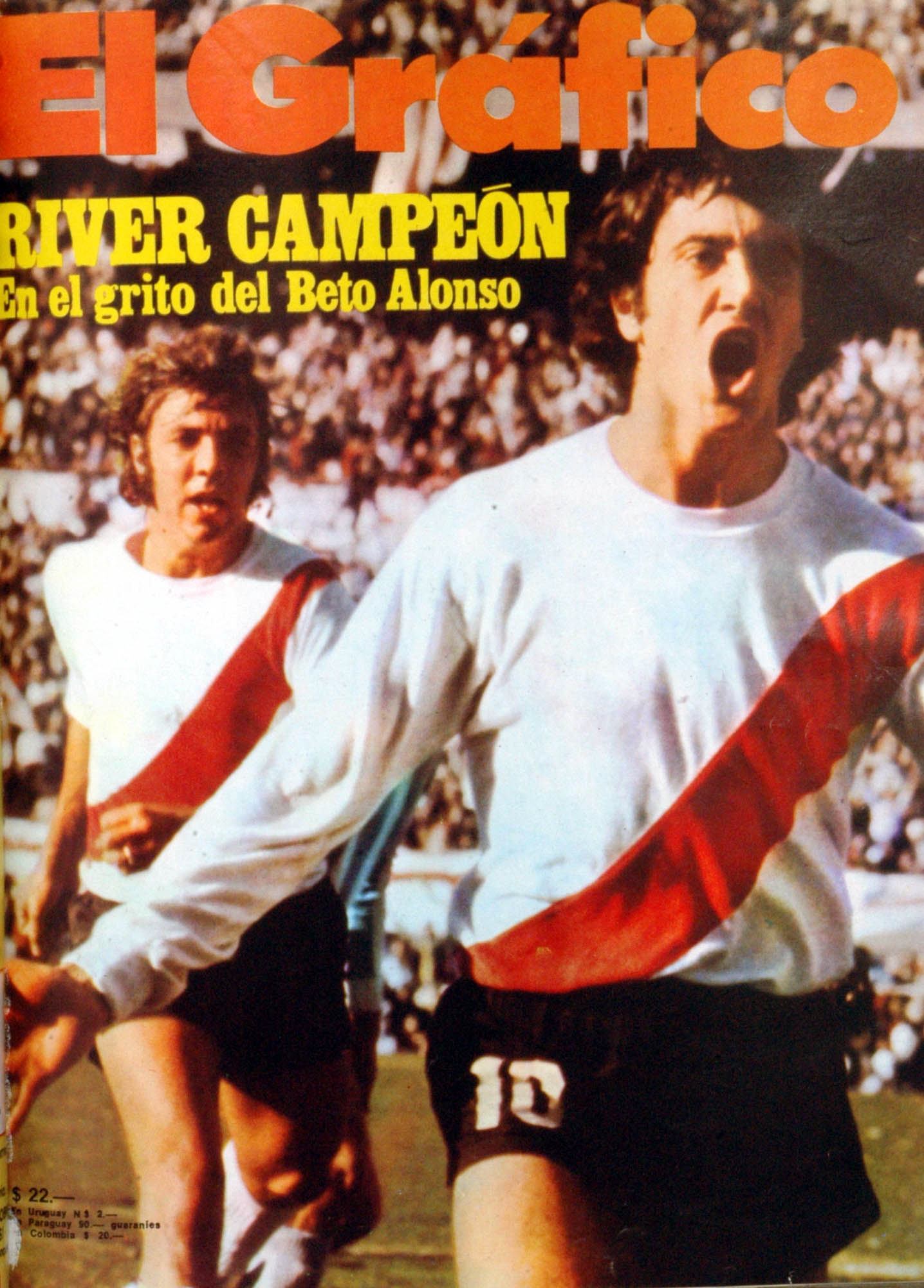 El Grafico del 20 de Agosto de 1975. Edicion 2915